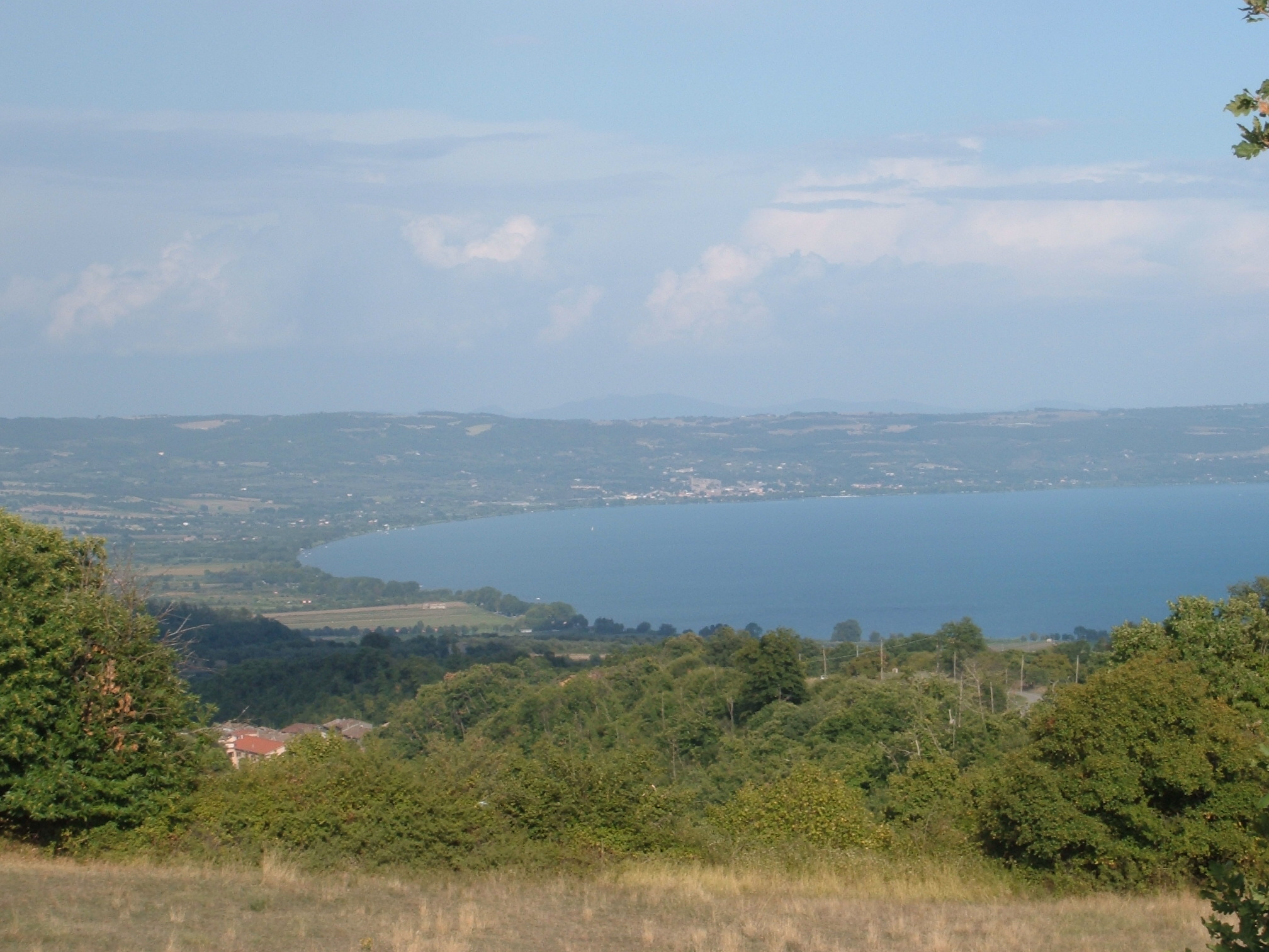 Il lago visto dai Monti Vulsini, presso Gradoli. Foto personale.